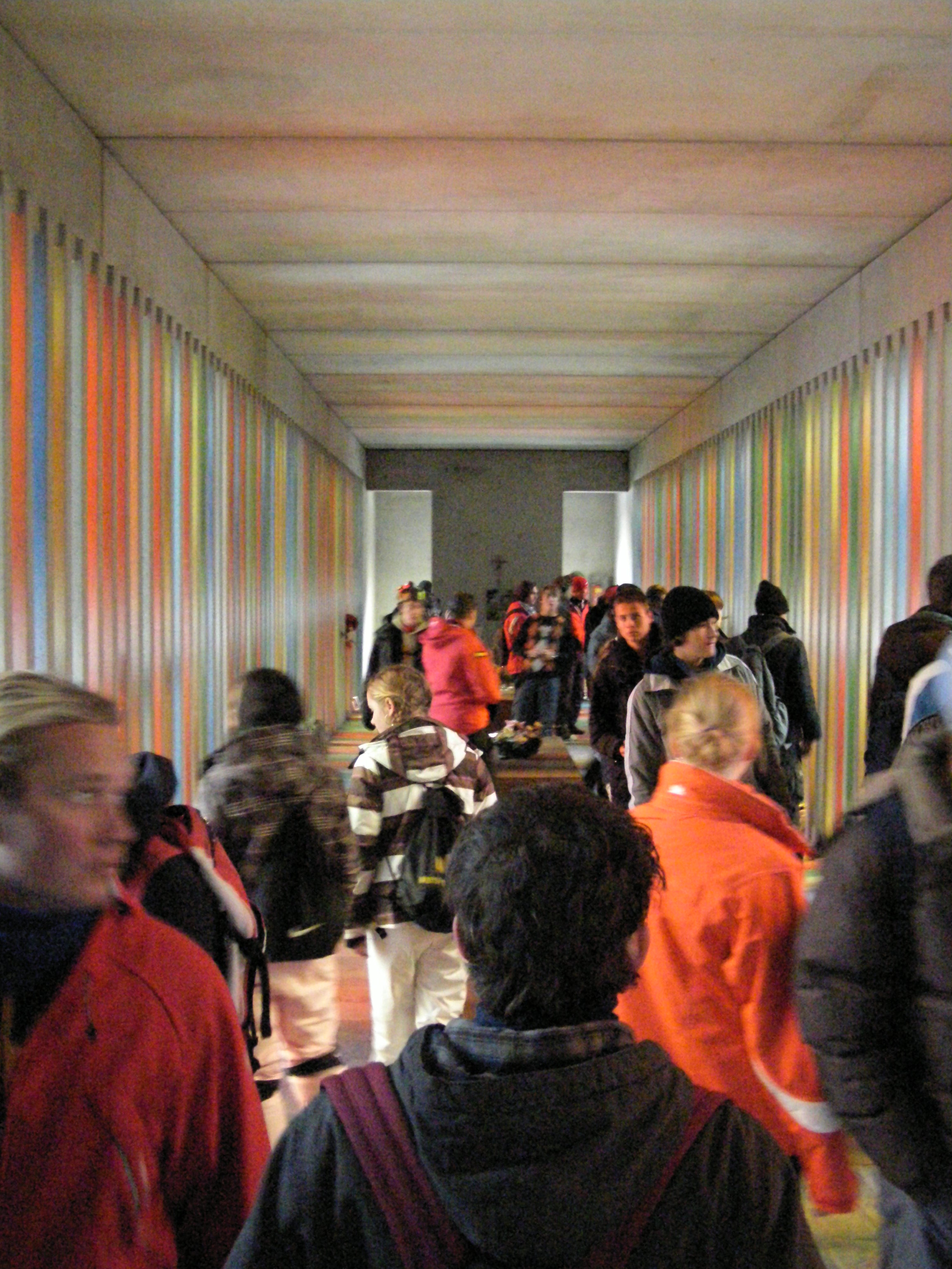 Gedenkstätte zum Andenken an den Gletscherbahnunfall in Kaprun 2000